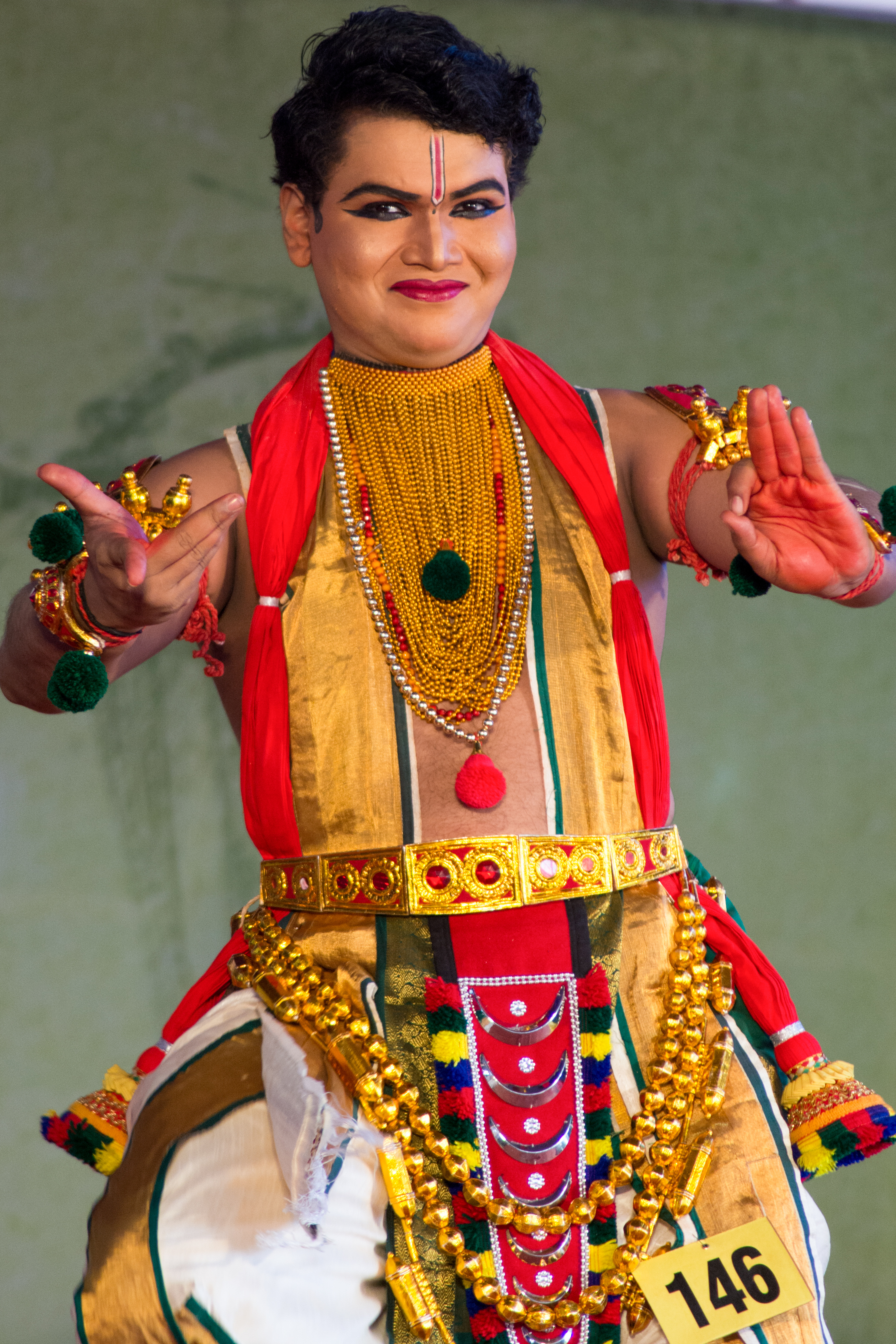 kerala school kalolsavam